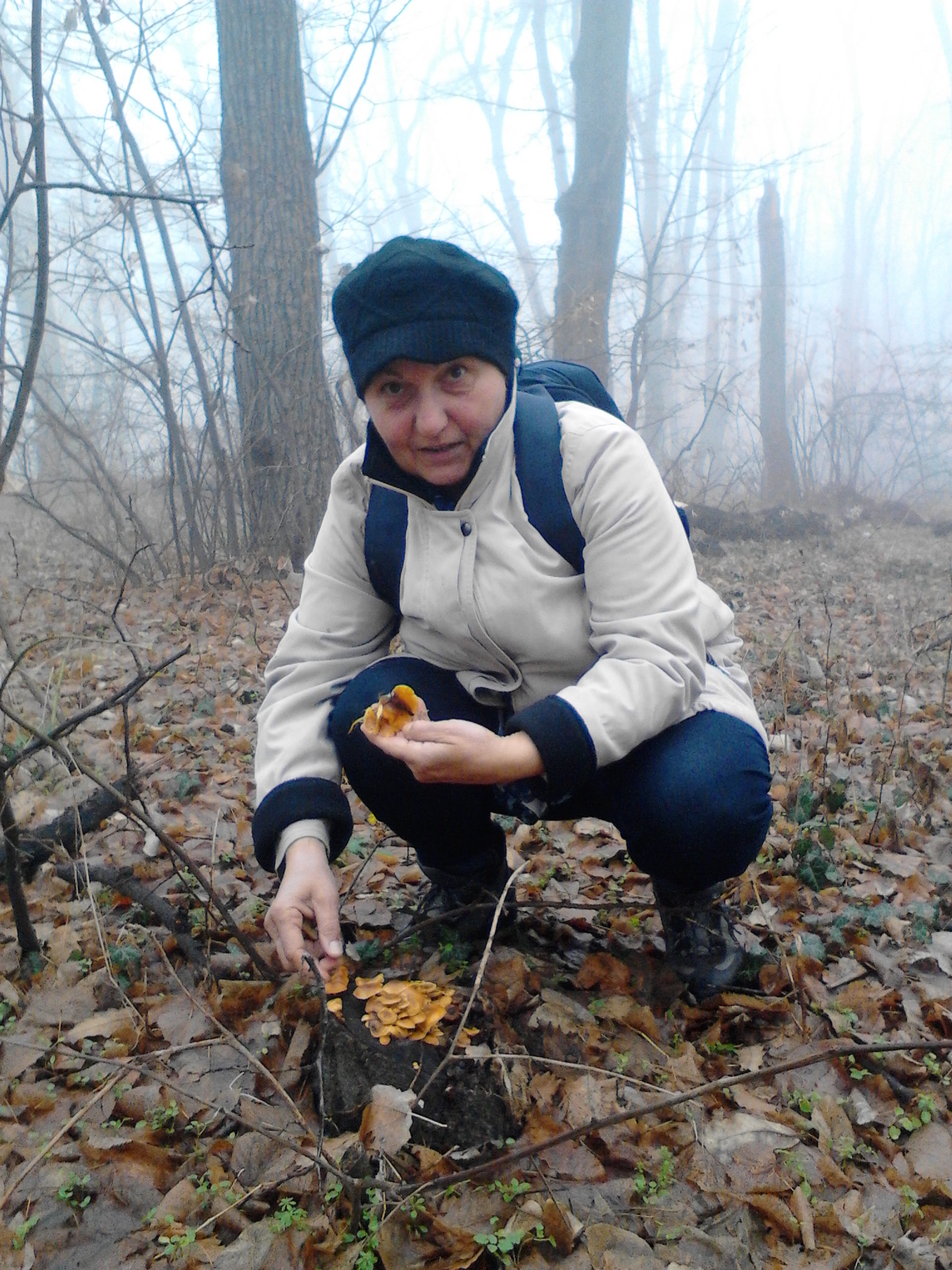 Članovi gljivarskog udružewa u gljivolovu.